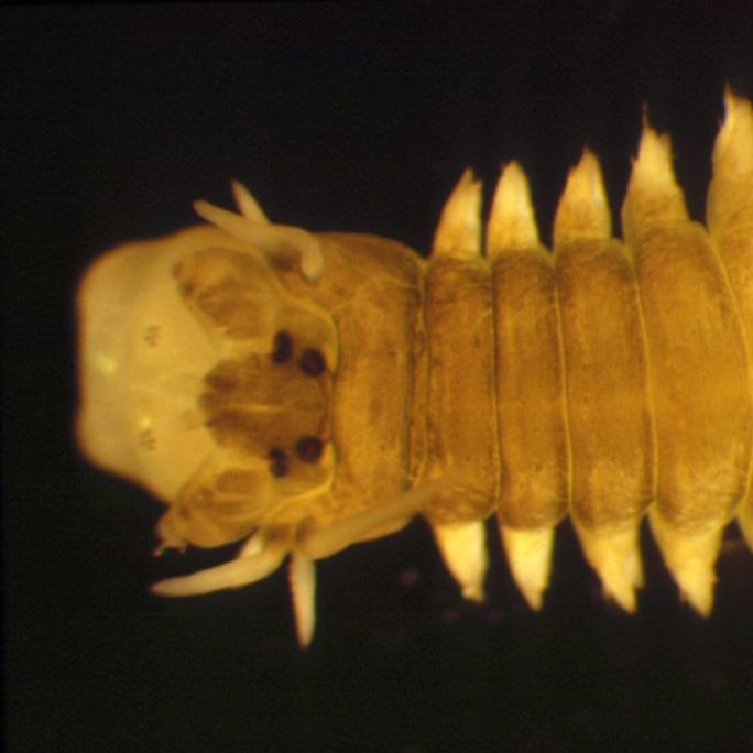 Ver marin